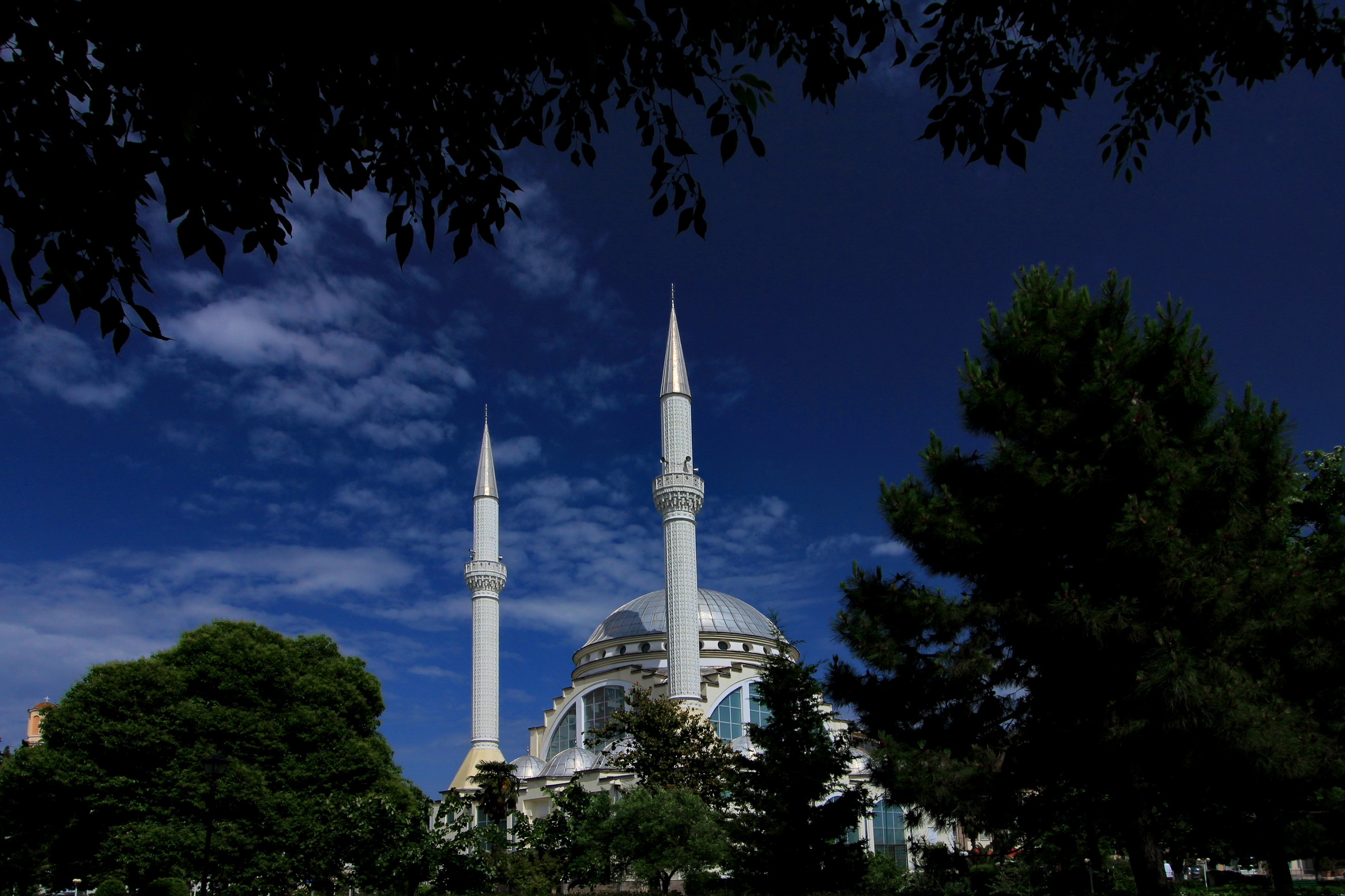 Xhami në Shkodër